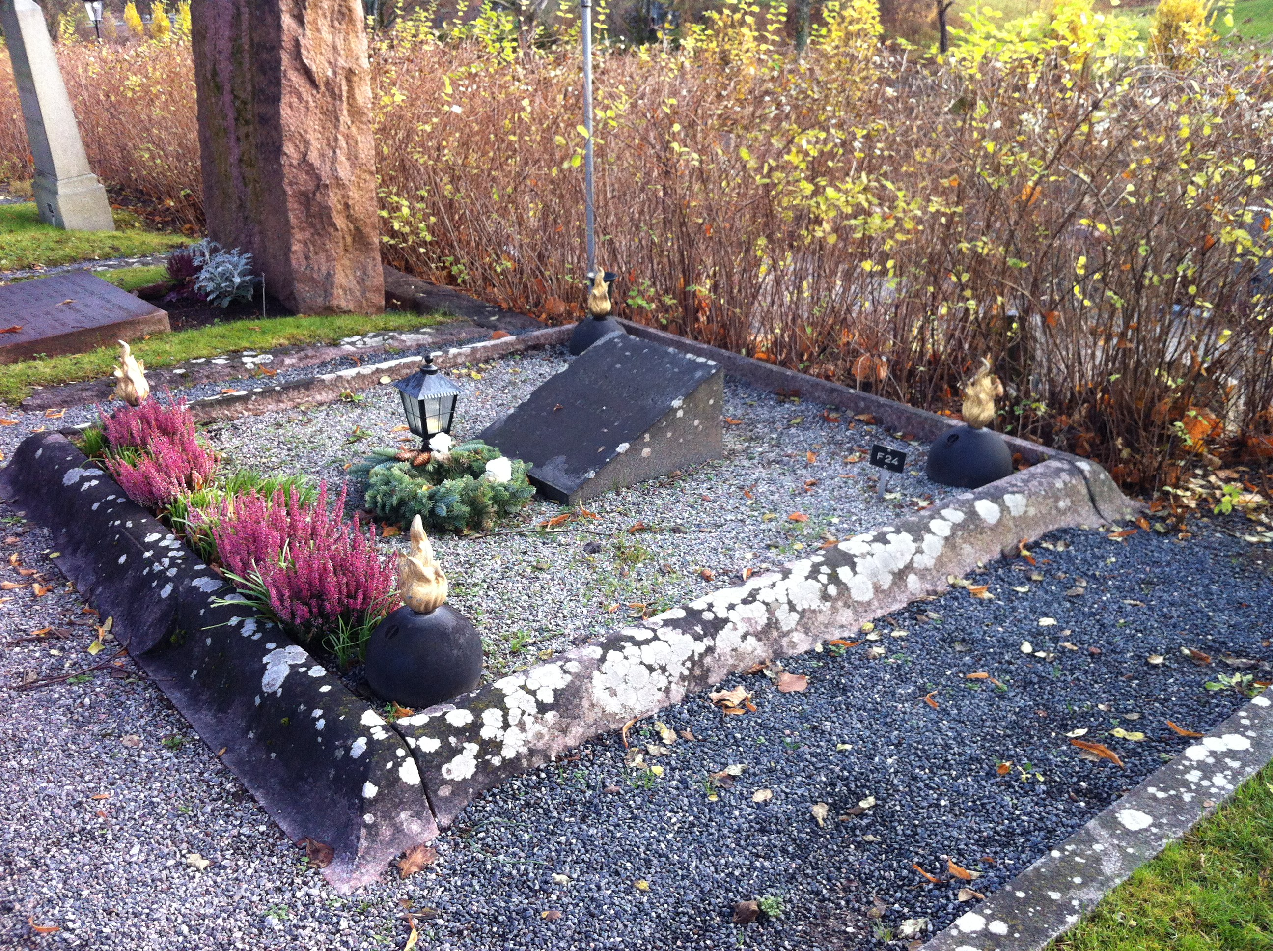 Törners Familjegrav